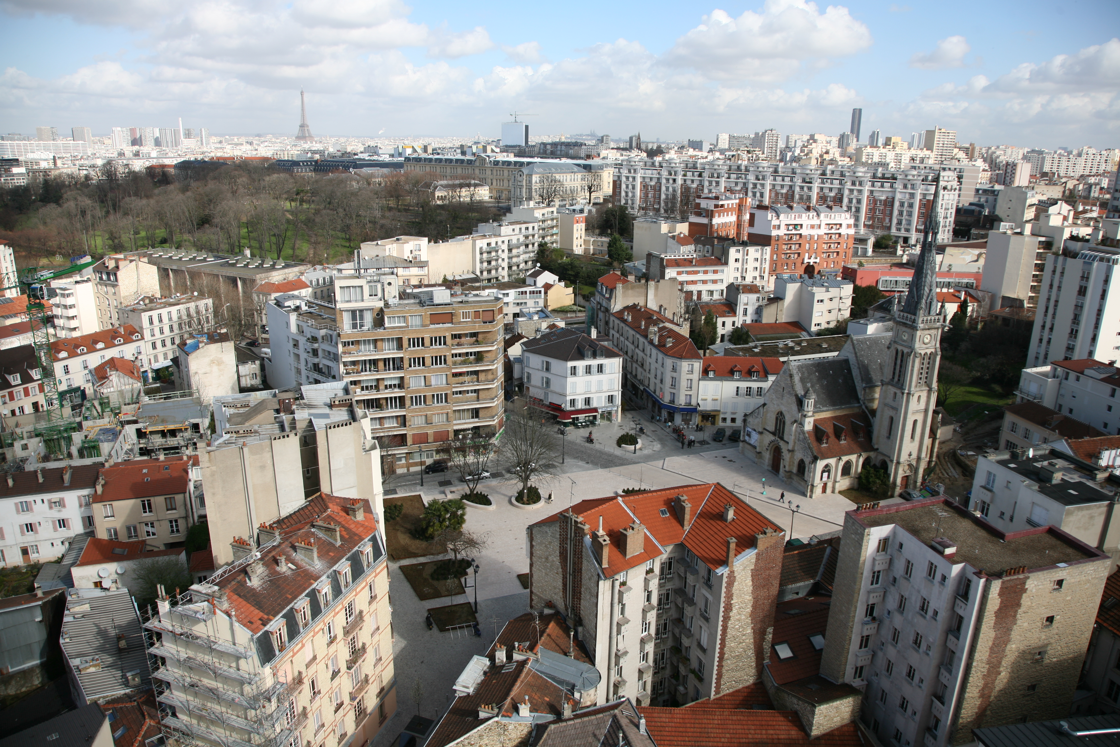 Photo aérienne de la Ville de Vanves